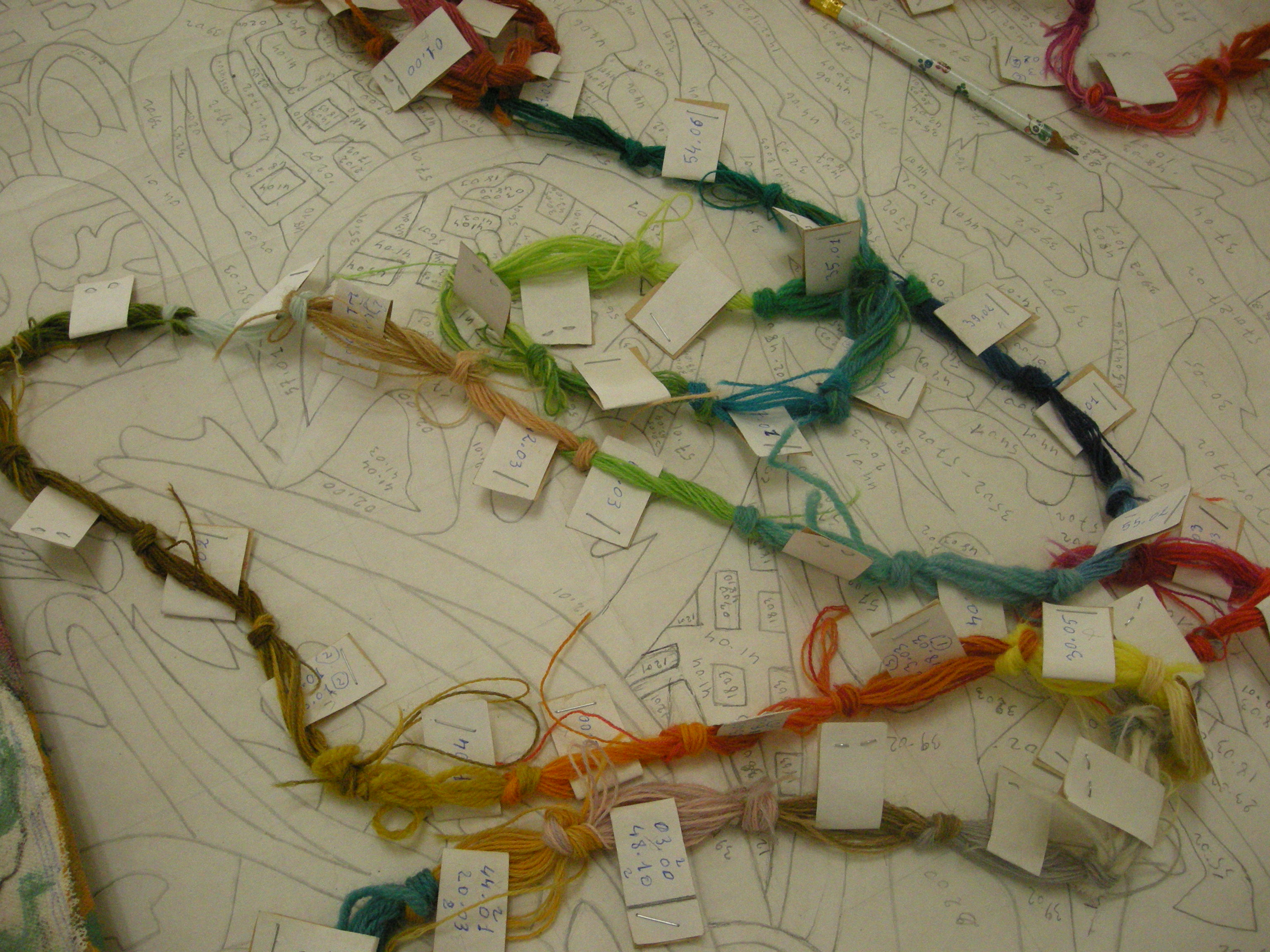 Les Manufactures sénégalaises des arts décoratifs (MSAD) à Thiès (Sénégal) : échantillonage des couleurs pour une réalisation en cours